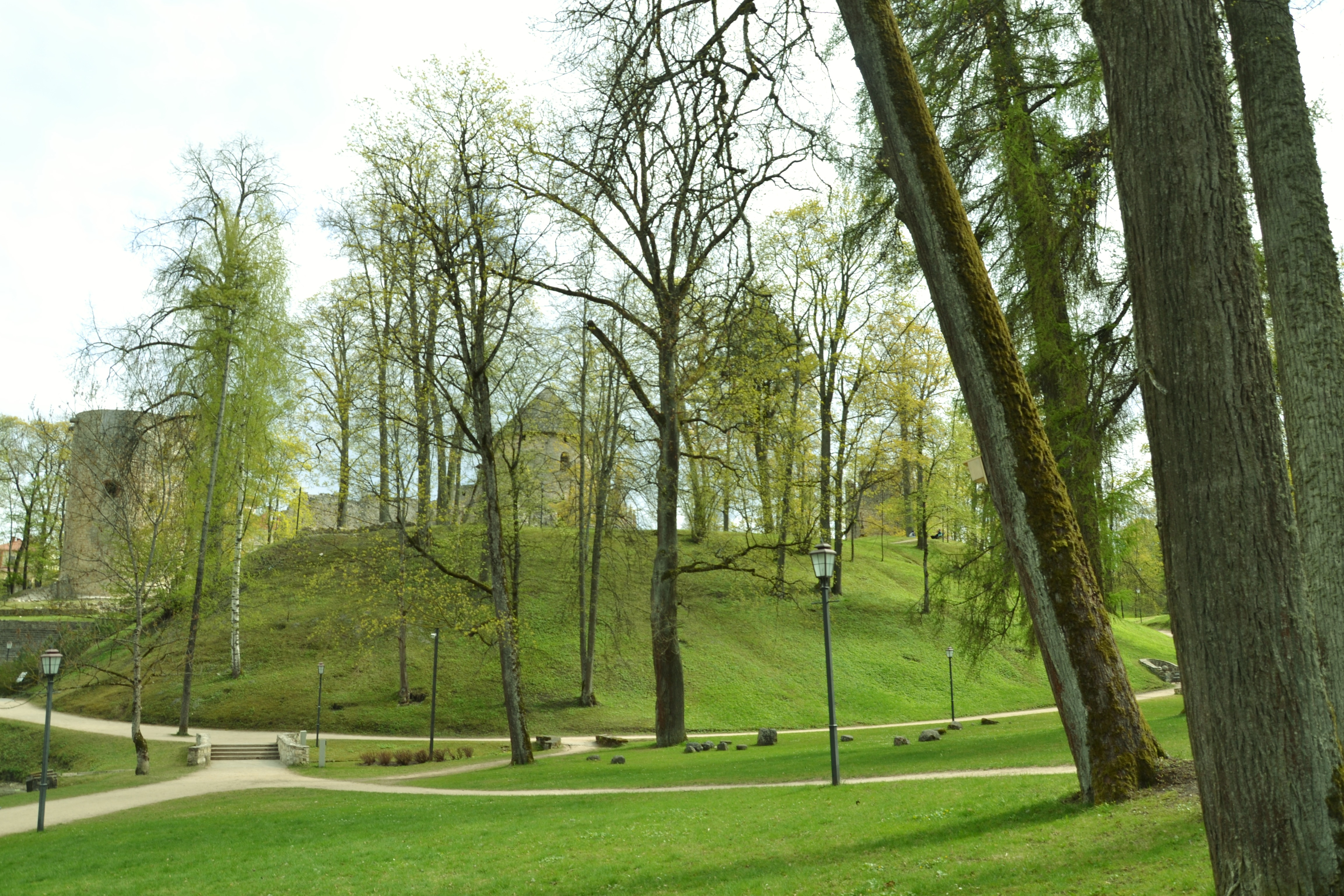 вендское городище Риекстукалнс в Цесисе